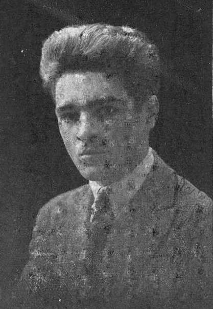 Augusto María Casas, fotografía en Vida Gallega 1925